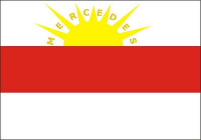 Bandeira do município de Mercedes